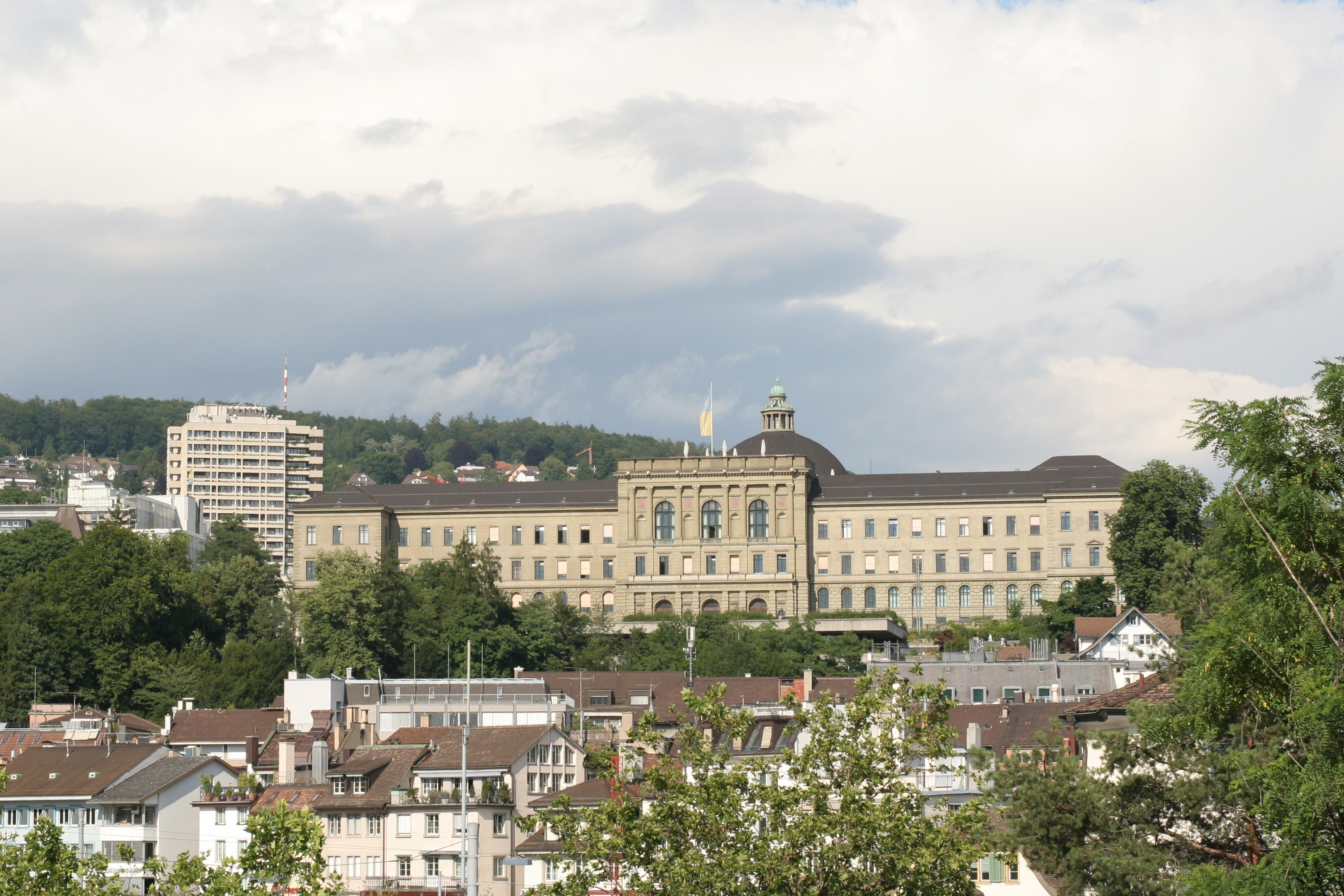 Breites Gebäude am Horizont: Hauptgebäude der ETH Zürich von Gottfried Semper (Südwestfassade). Oben in der Mitte befindet sich eine Terrasse mit Restaurant für die Dozierenden. Hochhaus am linken Bildrand: Universitätsspital, Frauenklinikstrasse 10